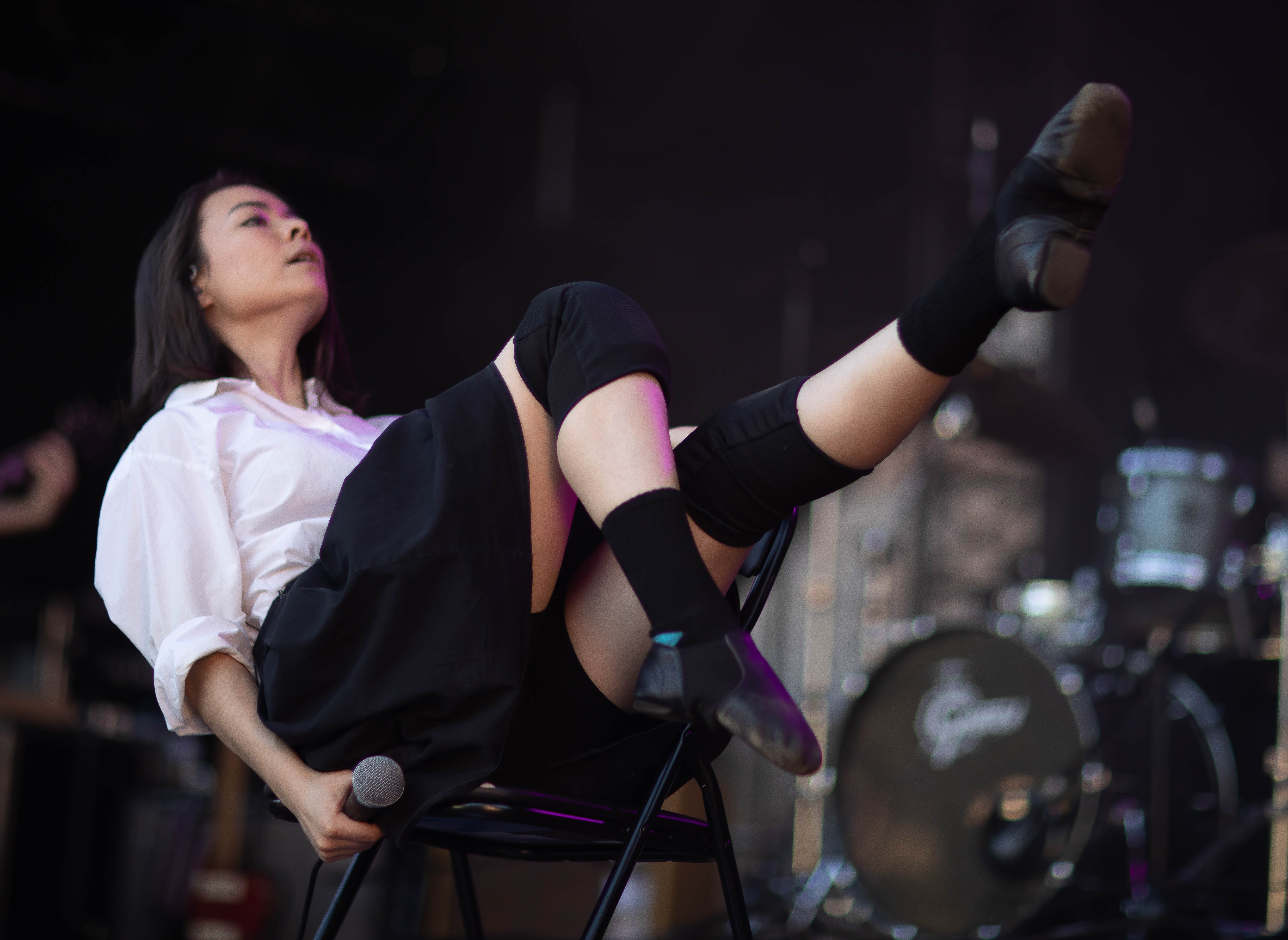 Mitksi